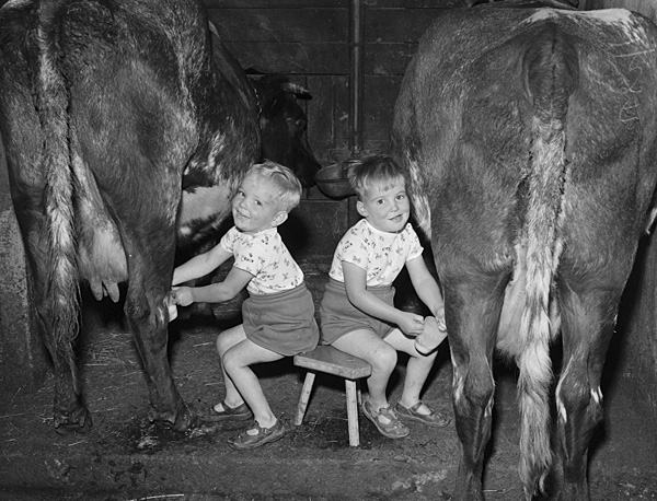 Teitl Cymraeg/Welsh title: Dau efaill ifanc o Landderfel sy'n godro'r fuwch bob dydd er mwyn cael llaeth i'w cathod. Cyfrwng/Medium: Negydd ffilm / Film negative Cyfeiriad/Reference: (gch20934) Rhif cofnod / Record no.: 3470381 Rhagor o wybodaeth am gasgliad Geoff Charles yn Llyfrgell Genedlaethol Cymru More information about the Geoff Charles Collection at the National Library of Wales